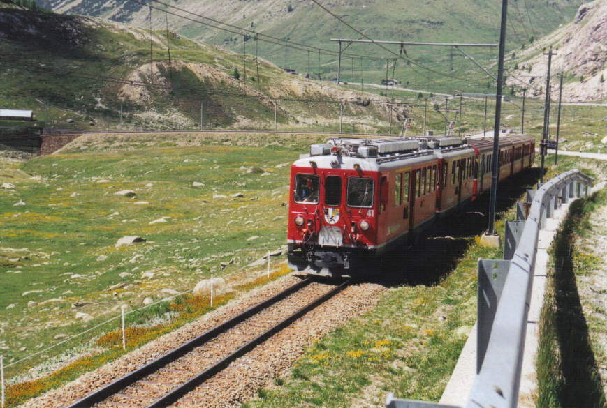 ABe 4/4 41 der RhB am 22. Juni 2003 unterhalb von Ospizio Bernina. Aufnahme: Steffen Mokosch Lizenz: GNU FDL